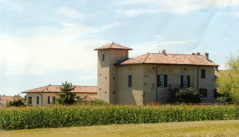 Cascina Rancate sita in via Cascina Rancate a Casatenovo (LC)